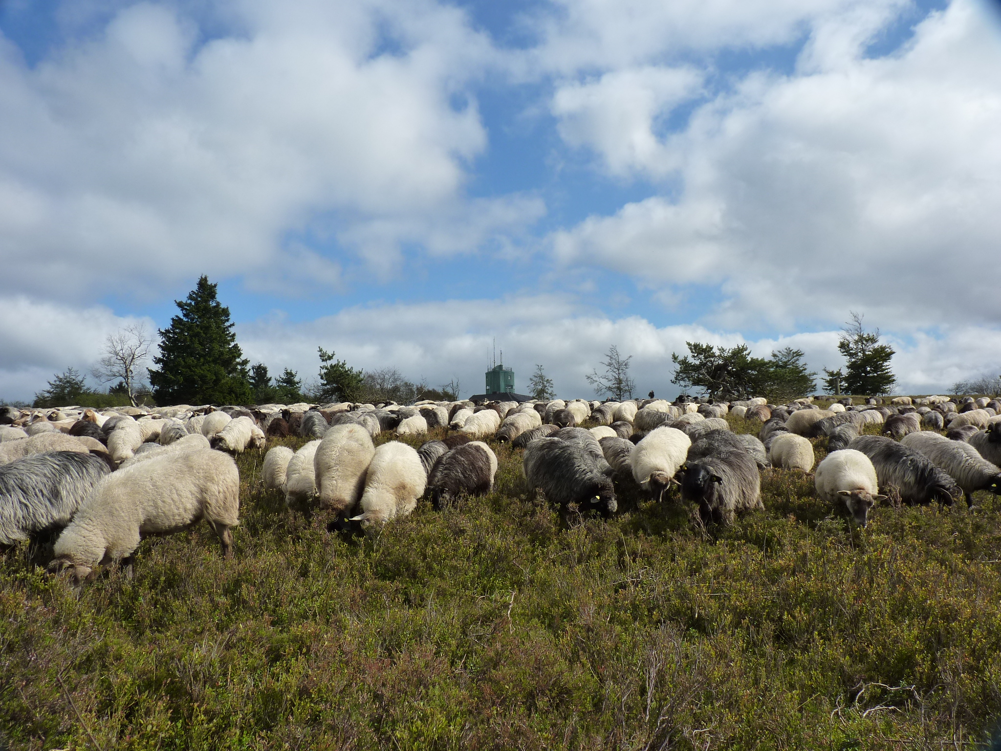 Schafe in der Hochheide auf dem Kahlen Asten, westlich des Astenturms (Hintergrund); abgebildeter Bereich im Naturschutzgebiet „Kahler Asten“ (HSK-008) in Winterberg